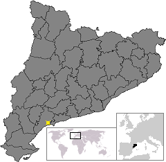 Localització de Cambrils. Location of Cambrils in Catalonia.